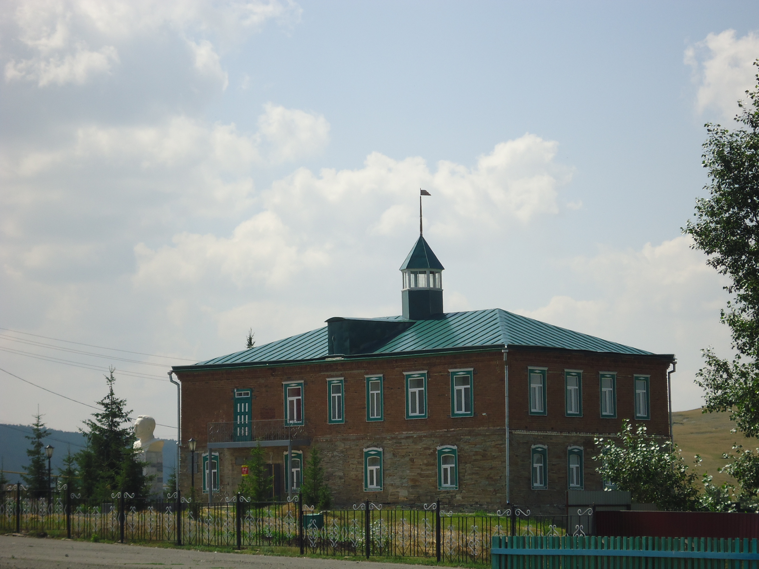 Башҡортса: Башҡортостан Республикаһы Баймаҡ районы Темәс ауылындағы музей